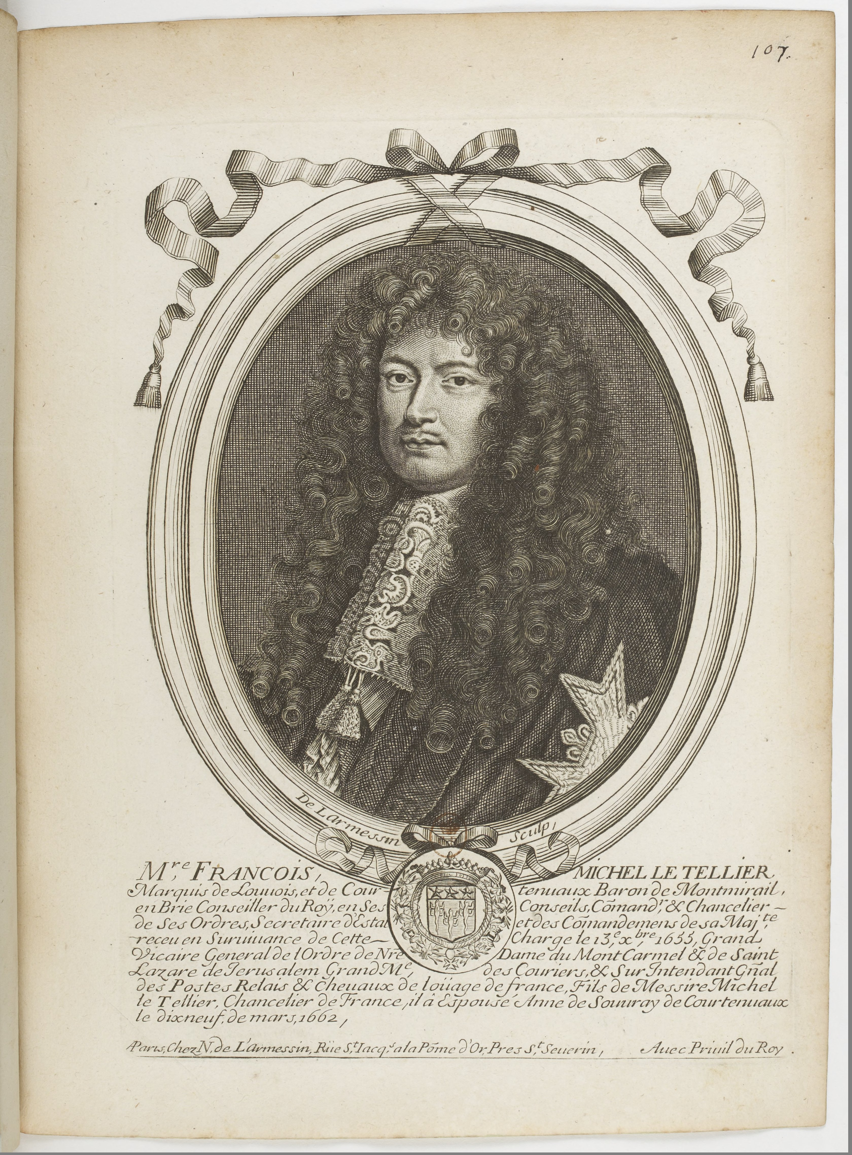 Les augustes représentations de tous les rois de France, depuis Pharamond jusqu'à Louis XIV,... avec un abrégé historique sous chacun, contenant leurs naissances, inclinations et actions plus remarquables pendant leurs règnes